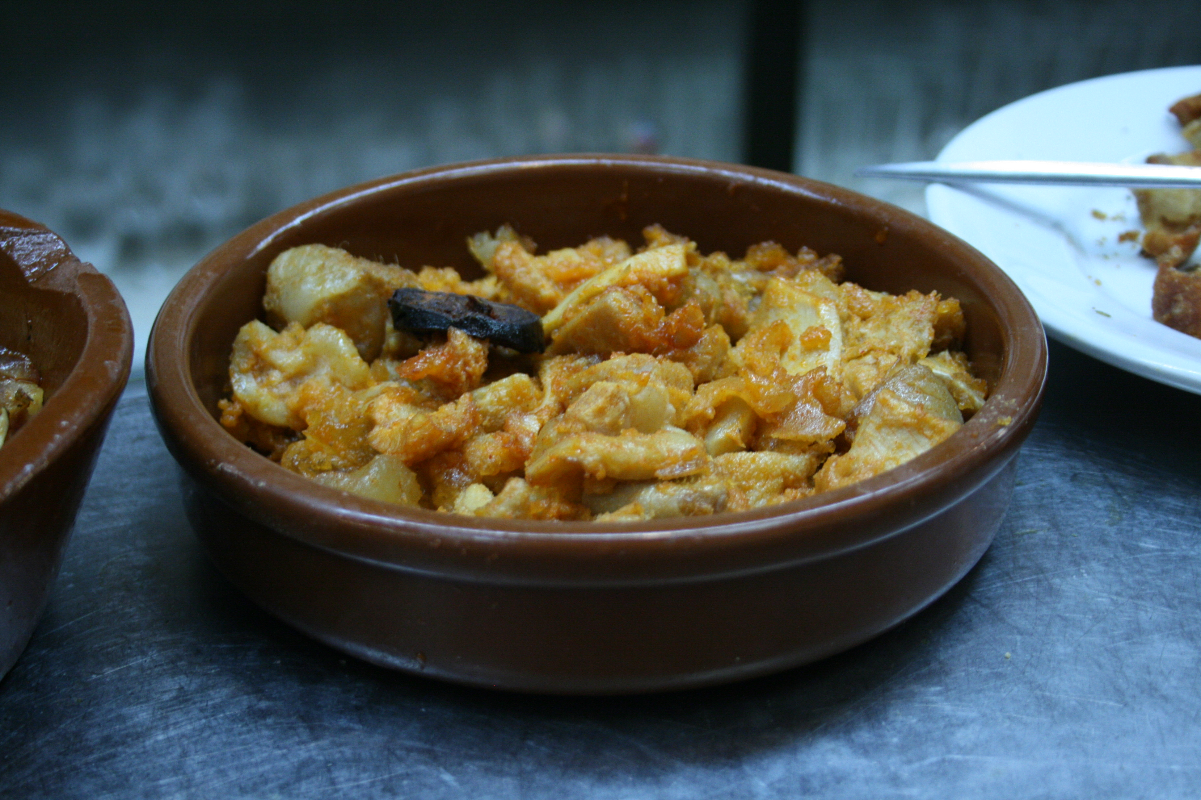 Callos a la madrileña, Kutteln nach Art von Madrid; in einem Lehmtopf geschmort